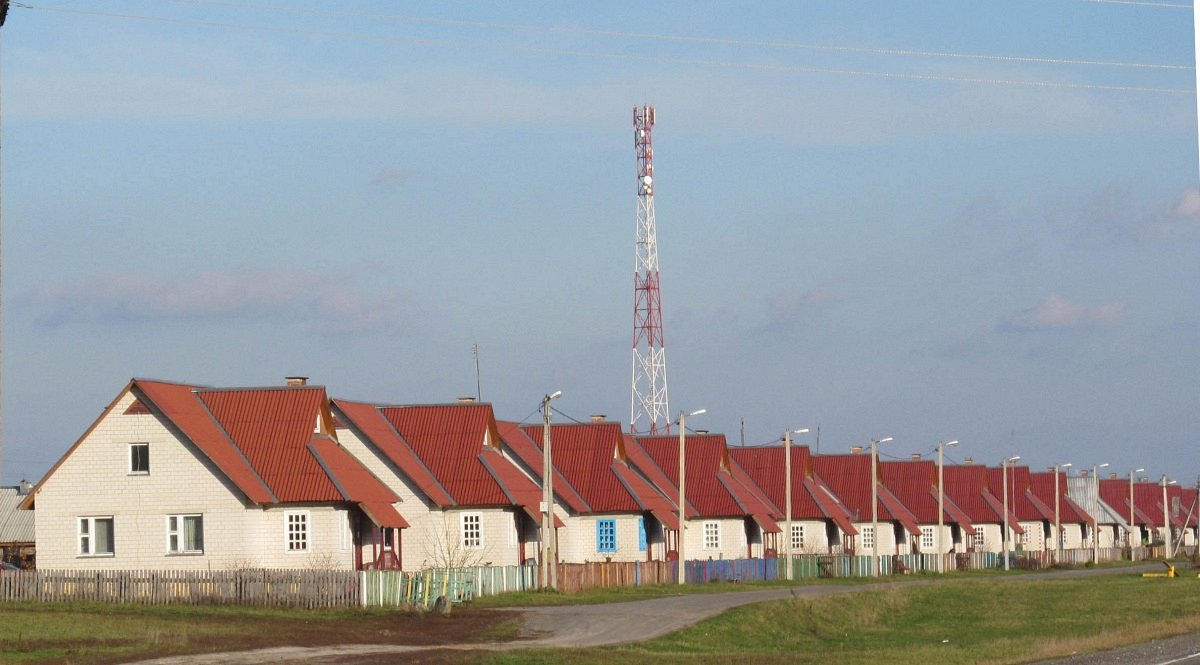 Аграгарадок Баравое, Лельчыцкі раён